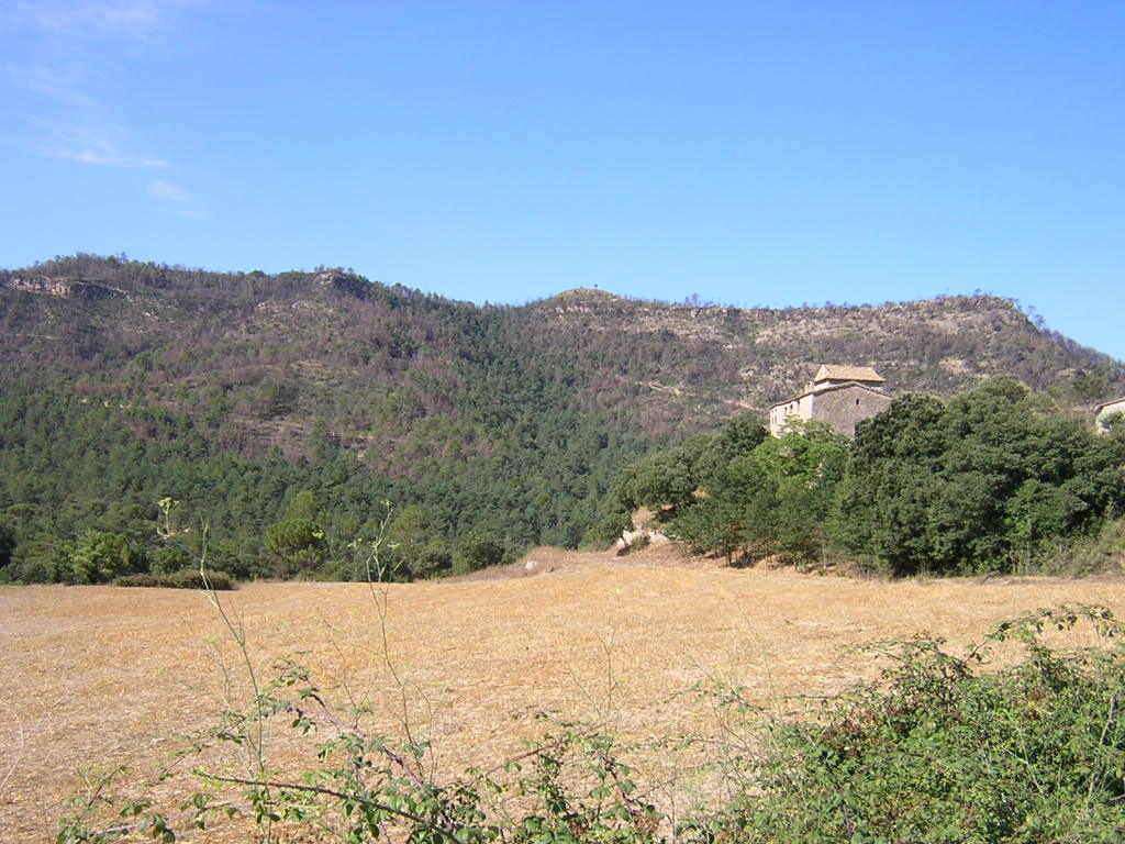 Els Plans de Rubió (Monistrol de Calders, Moianès)